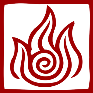 Emblema de la nacion del fuego de Avatar